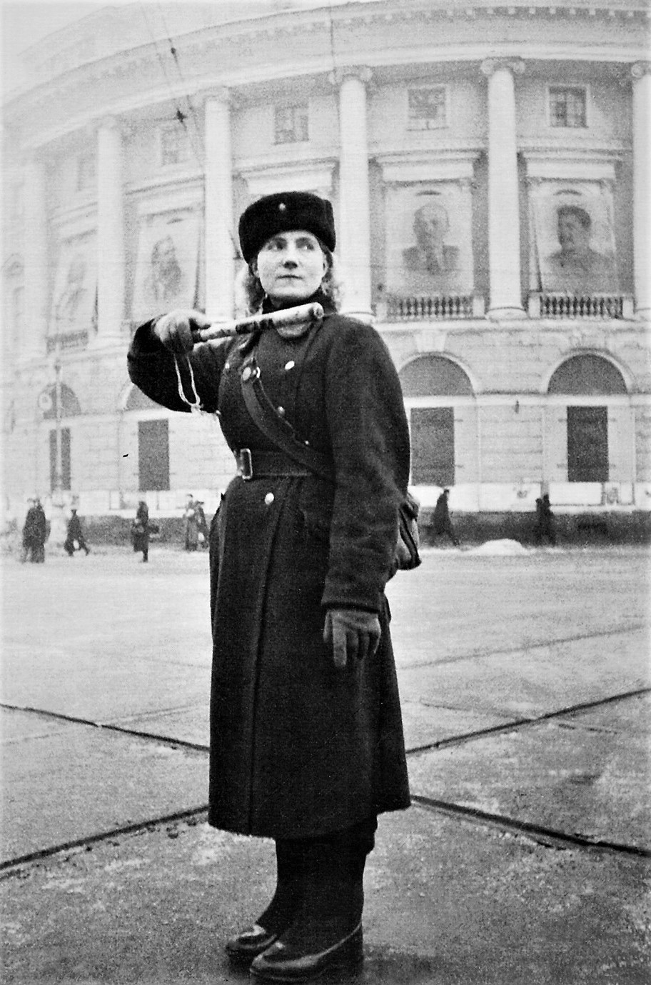 Регулировщица старшина милиции Анна Федорова на перекрестке Невского проспекта и Садовой улицы Ленинграда